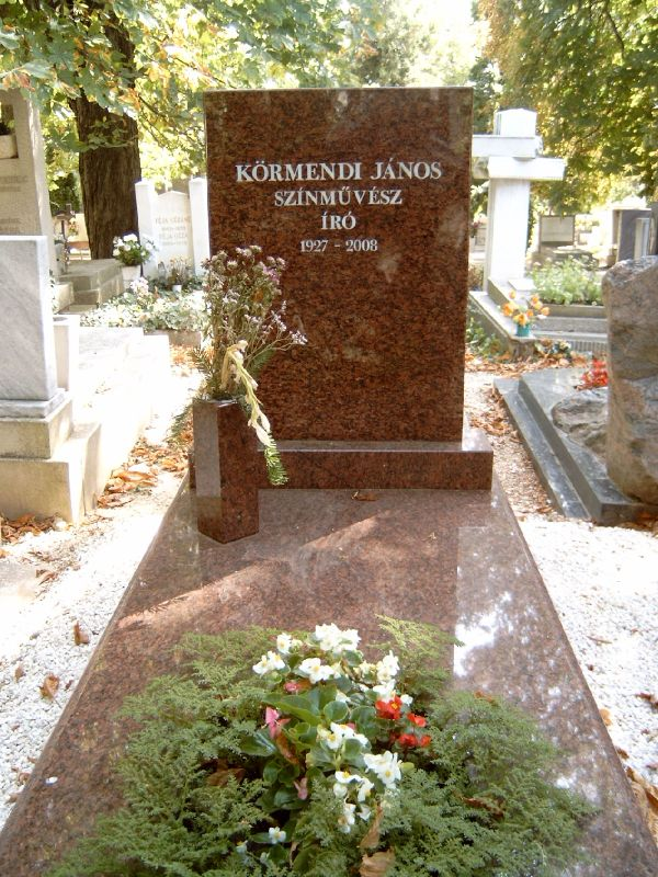 Körmendi János sírja Budapesten. Farkasréti temető: 25-2-61.